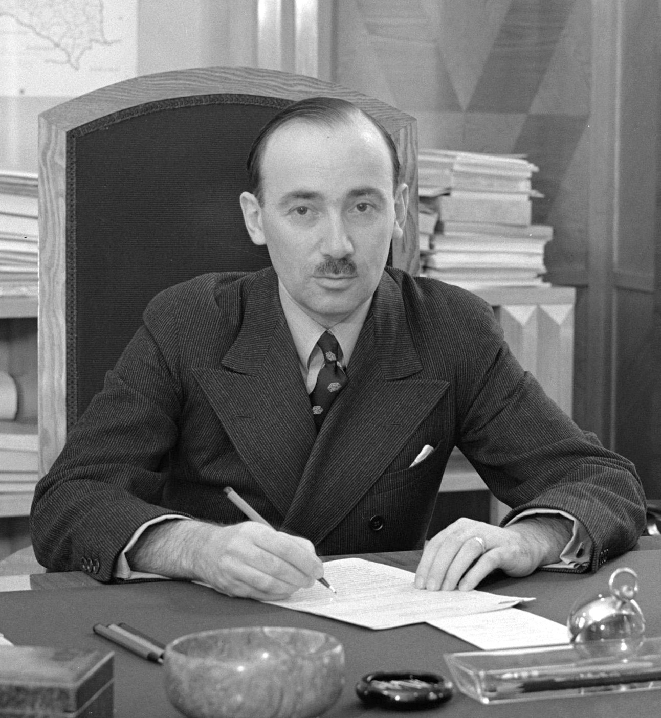 Wacław Jędrzejewicz